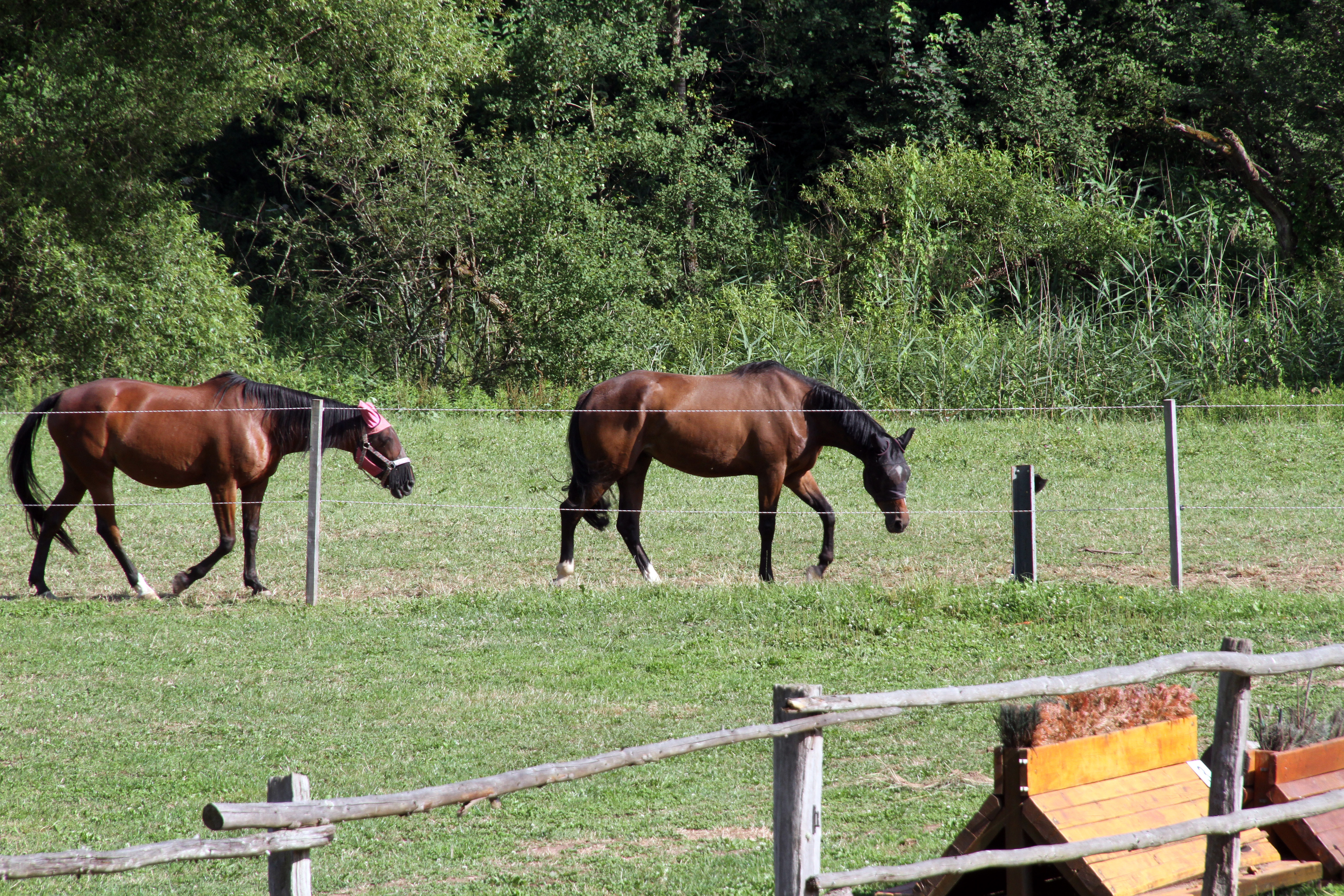 Walshausen